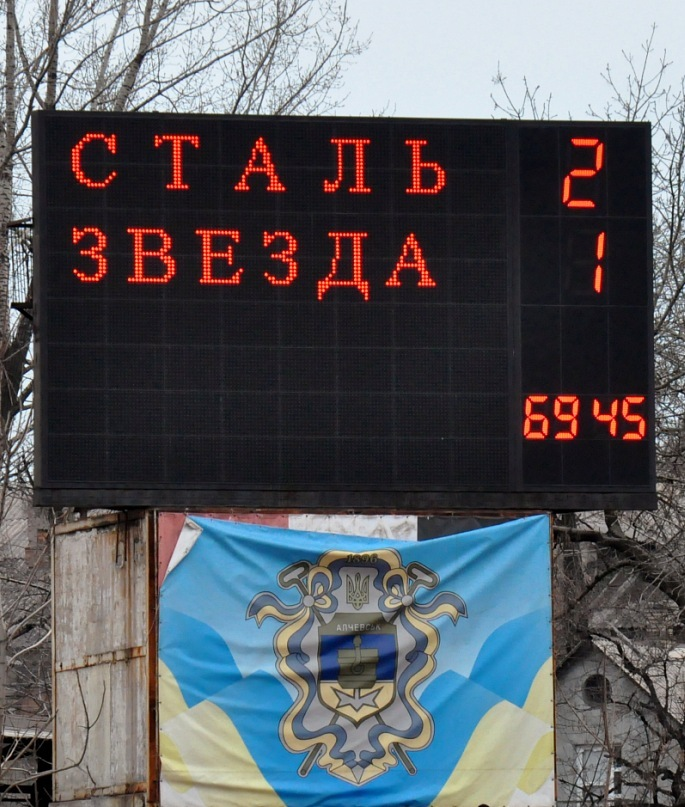 Табло стадиона «Сталь» в Алчевске